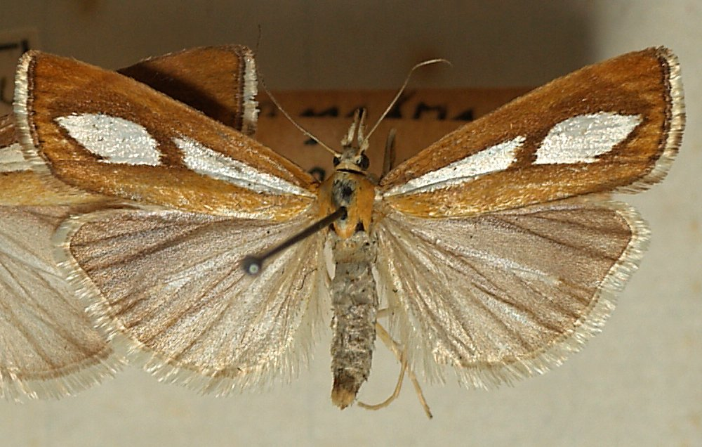 Catoptria conchella